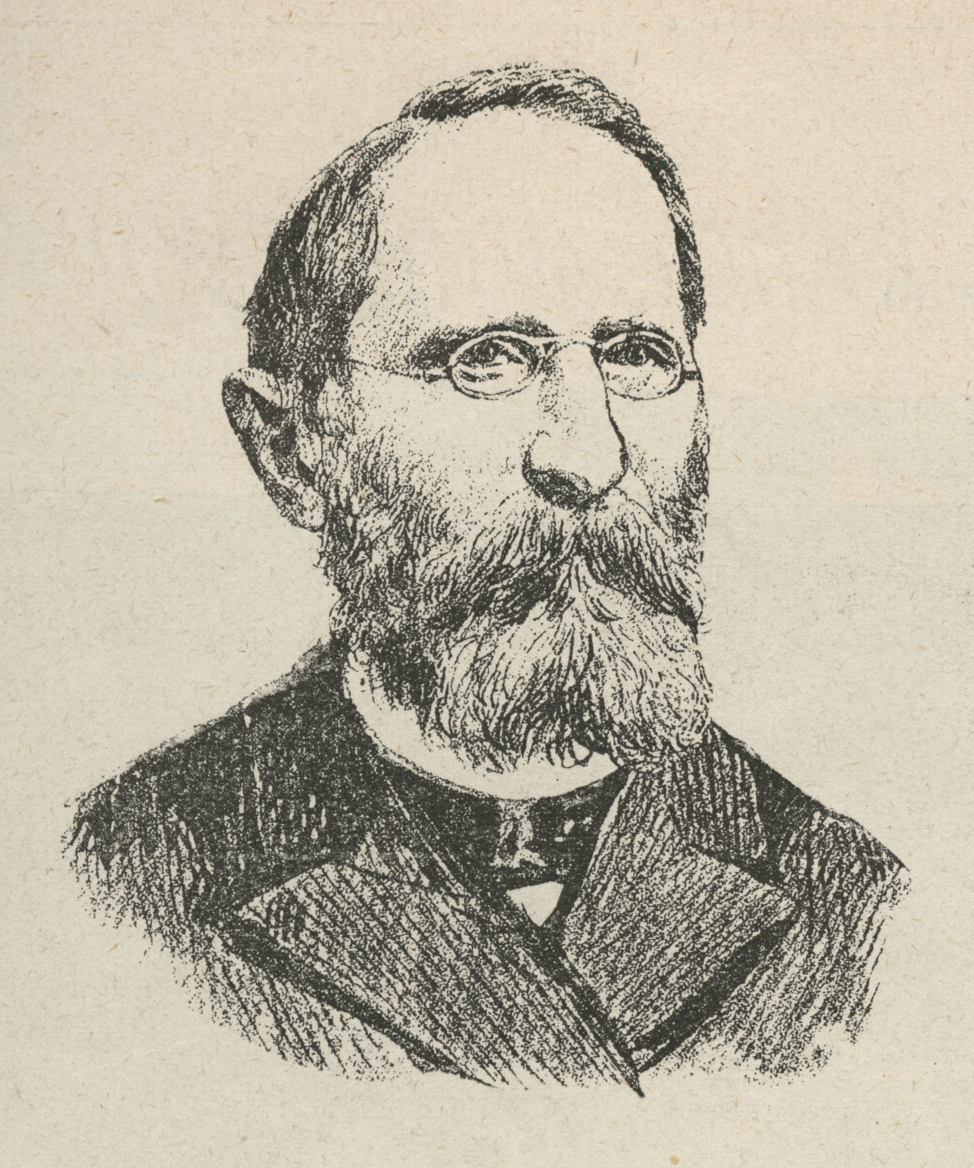 Karol Jurkiewicz